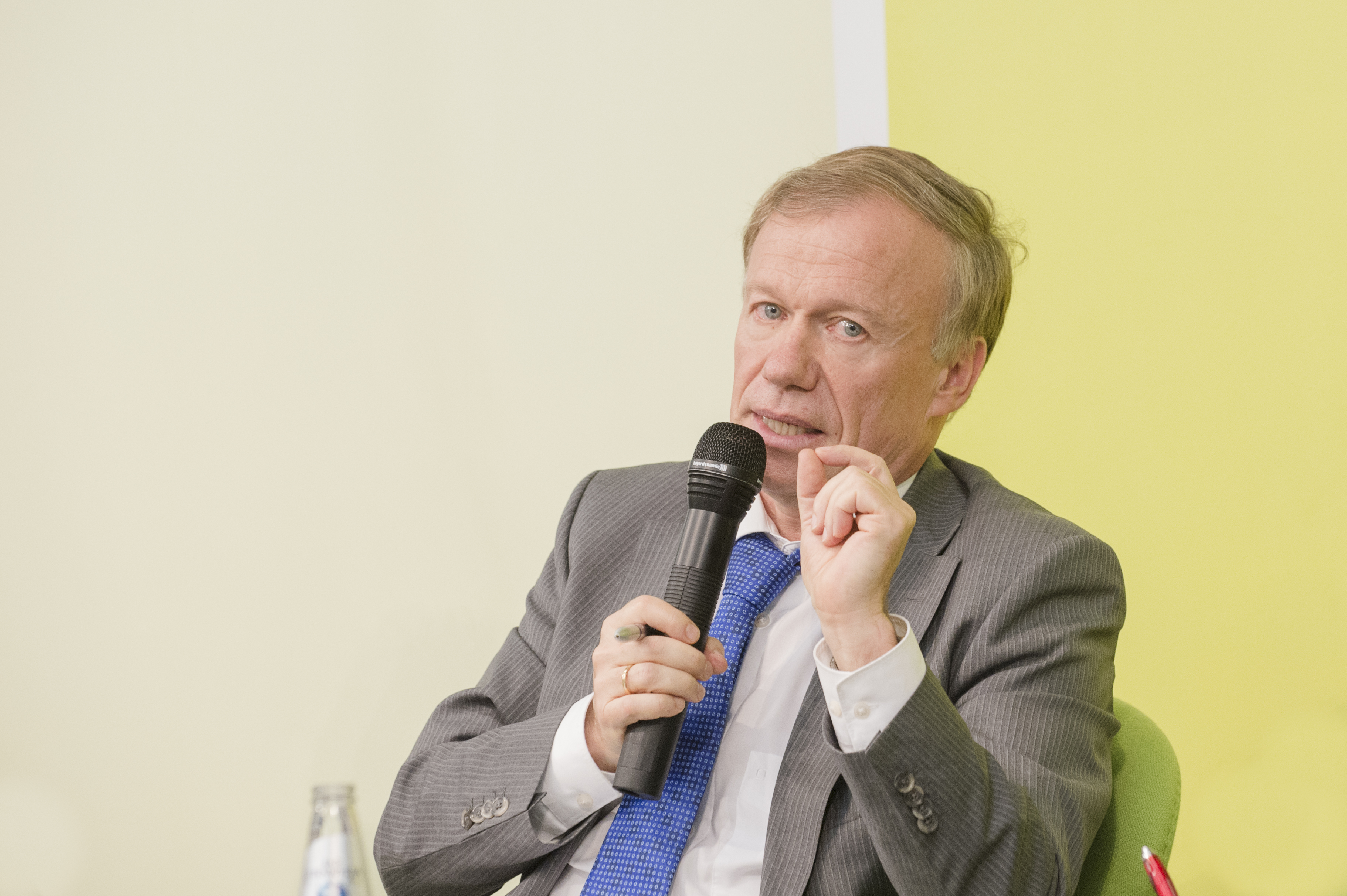 Botschafter Rolf Nikel (Beauftragter der Bundesregierung für Fragen der Abrüstung und Rüstungskontrolle, Berlin), Foto: Isis Martins